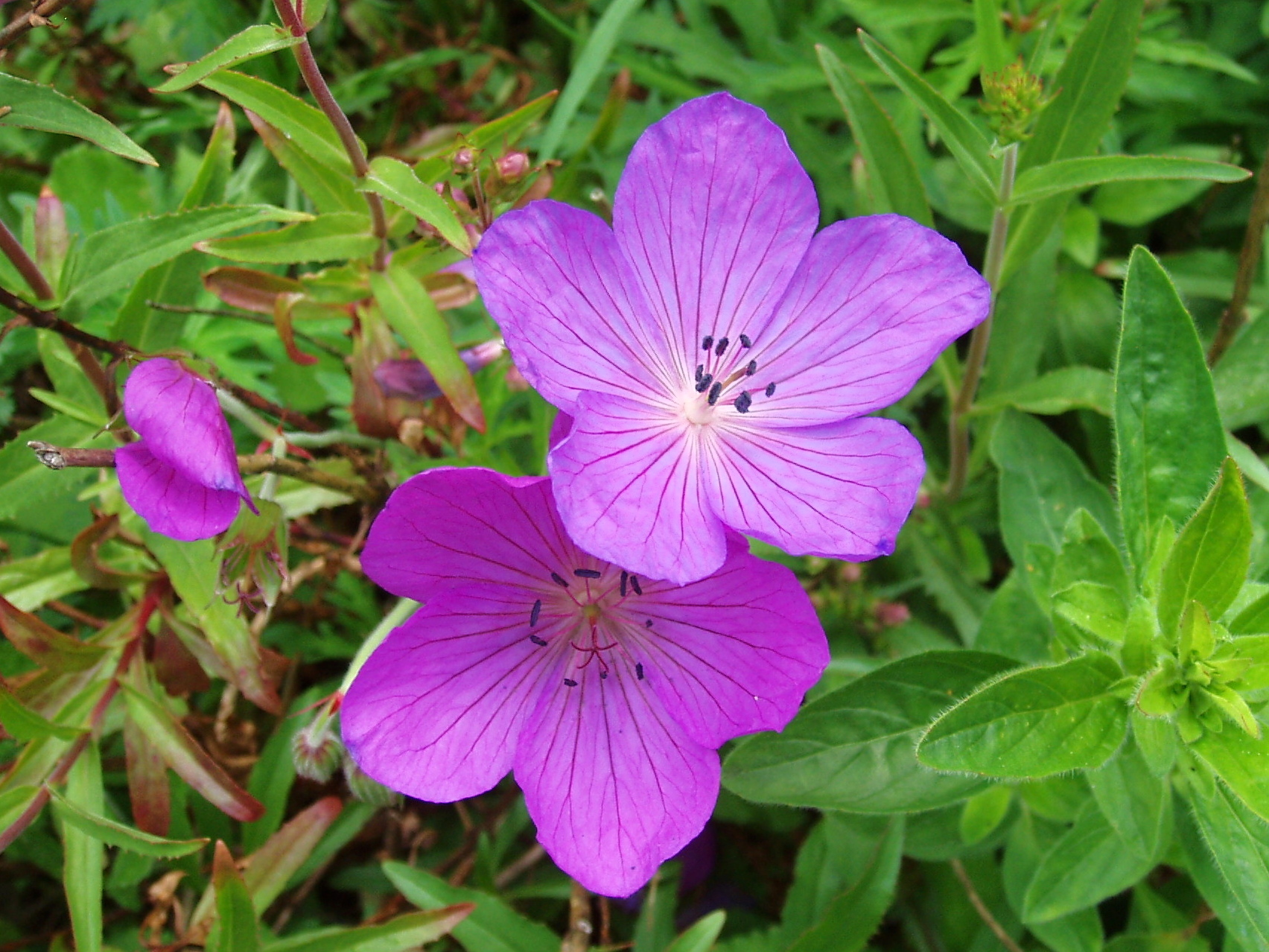 Geranium clarkei 'Kashmir Purple'